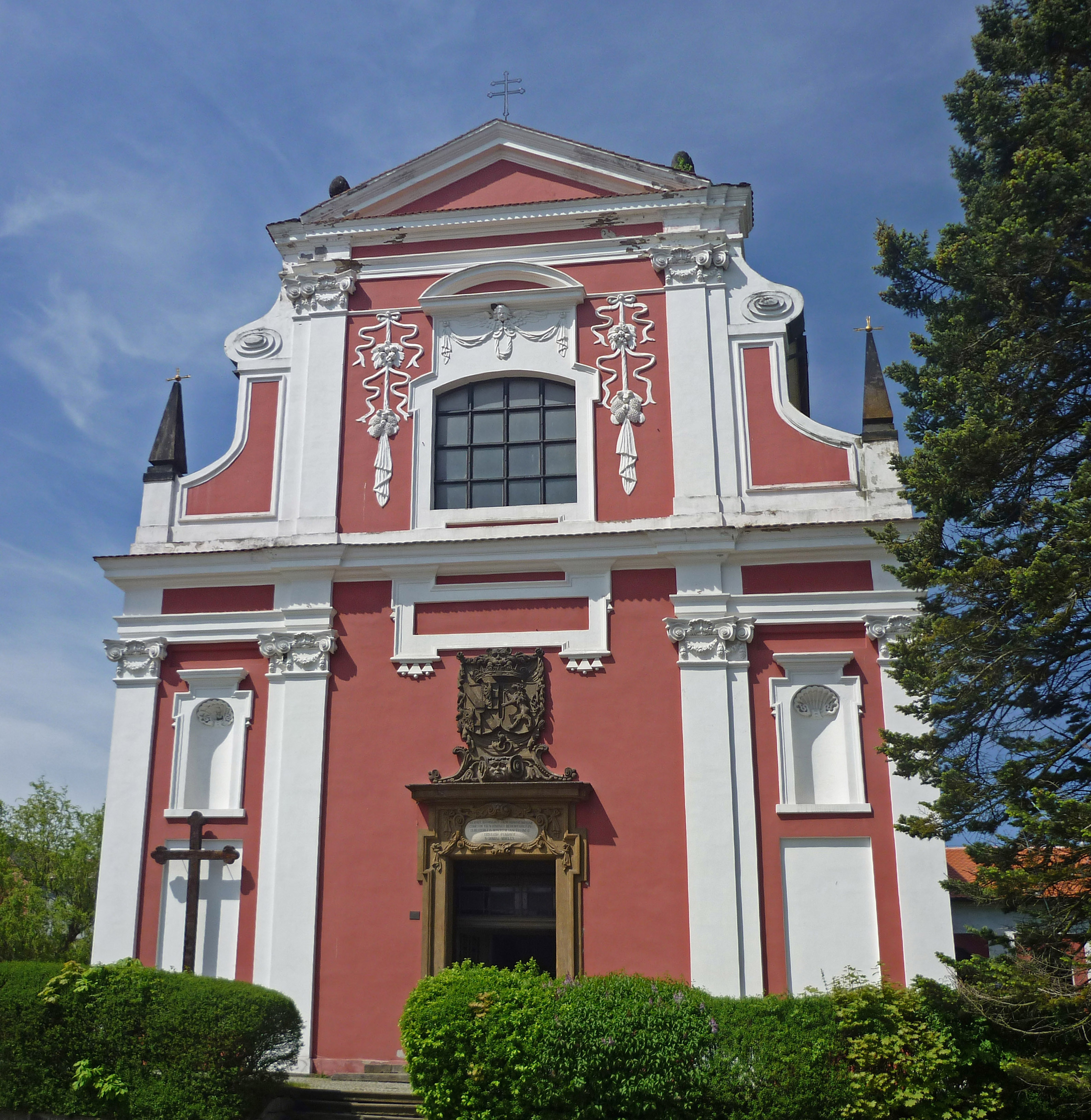 Allerheiligenkirche in Klösterle (Klášterec nad Ohří)